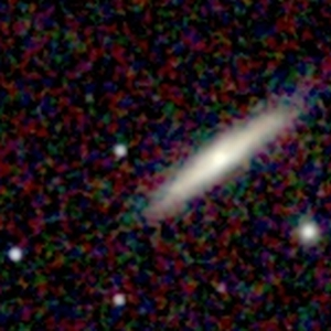 Galaxy NGC 52